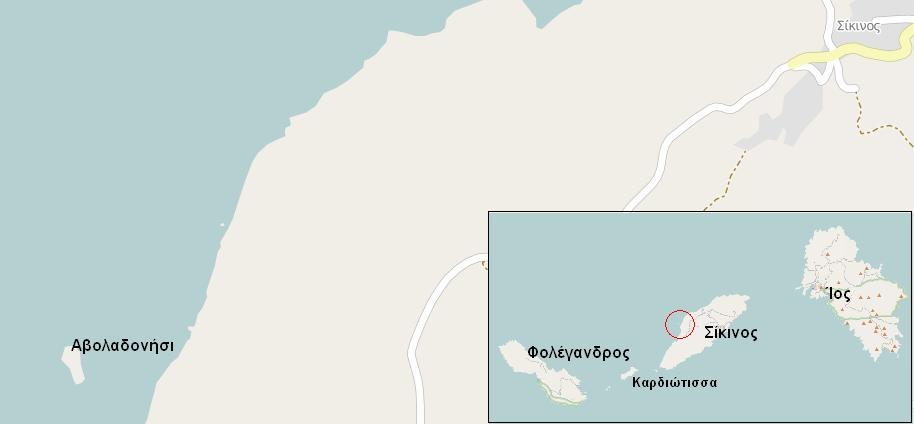 Αβολαδονήσι Σικίνου